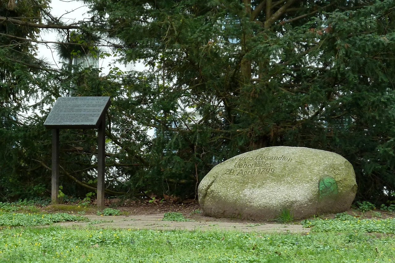 Gedenkstein und Gedenktafel an den Rastatter Gesandtenmord. Der Stein und die Tafel befinden sich in einem kleinen Park in der Nähe der Strassenkreuzung "Am Gedenkstein" und "Kinkelstrasse".